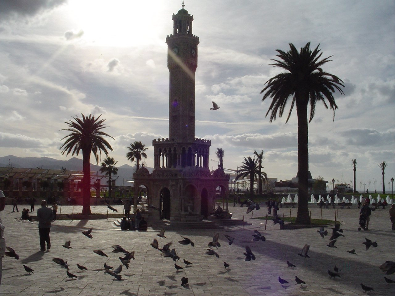 Zeynel Cebeci